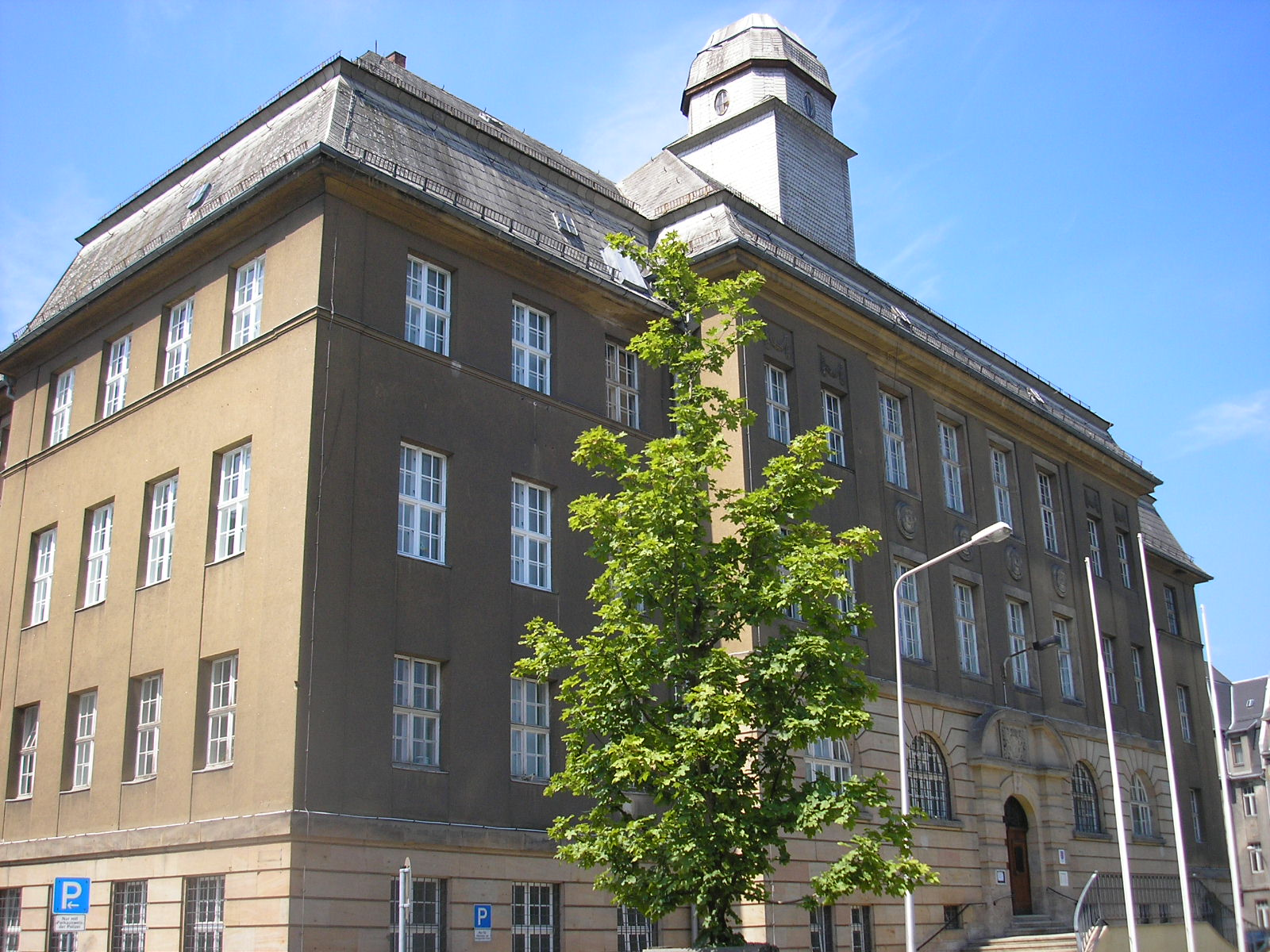 Das Amtsgericht Greiz (Thüringen).